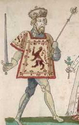 King Robert II